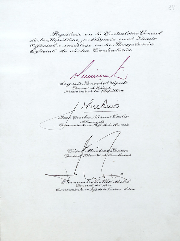 Constitución Política de la República de Chile. 1980. Archivo Histórico. Nacional En Bóveda.